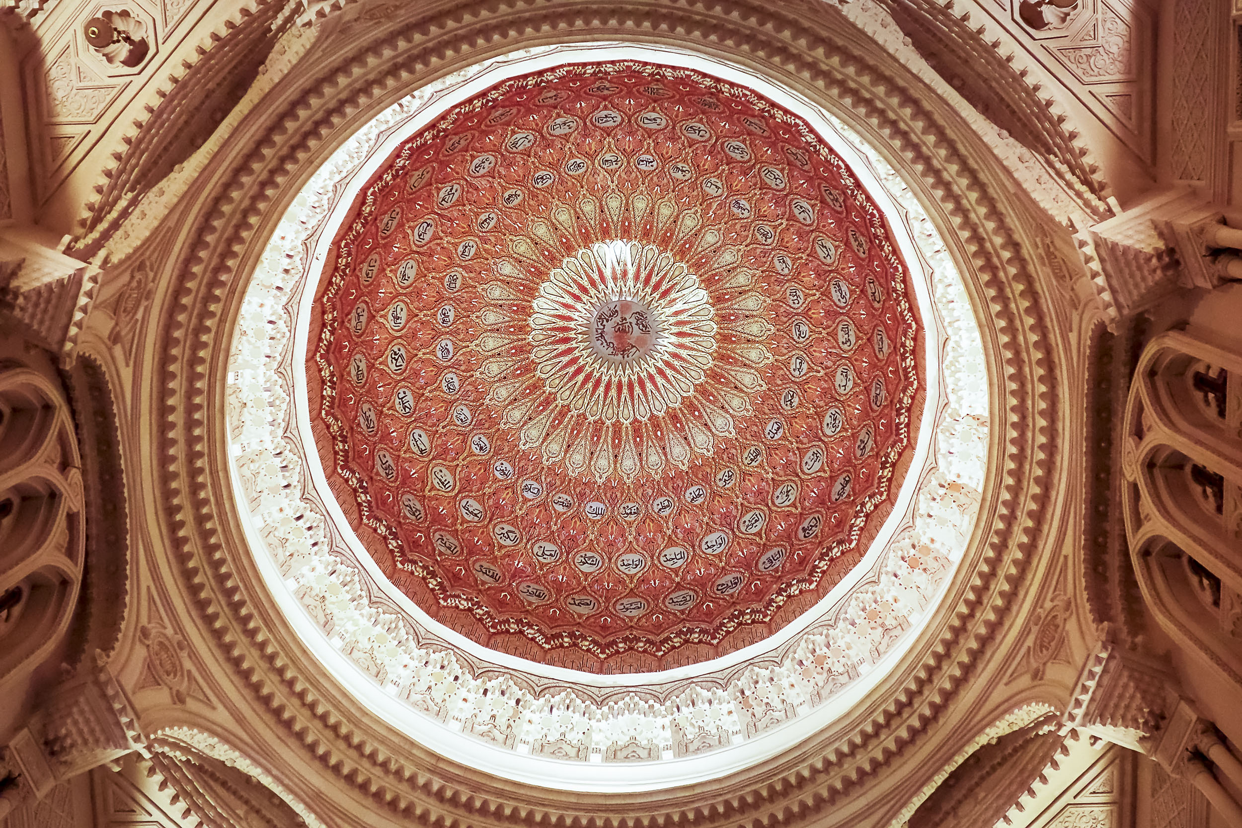 Coupole de la mosquée Emir Abdelkader - Constantine قبة مسجد الامير عبد القادر Wilaya de Constantine ولاية قسنطينة